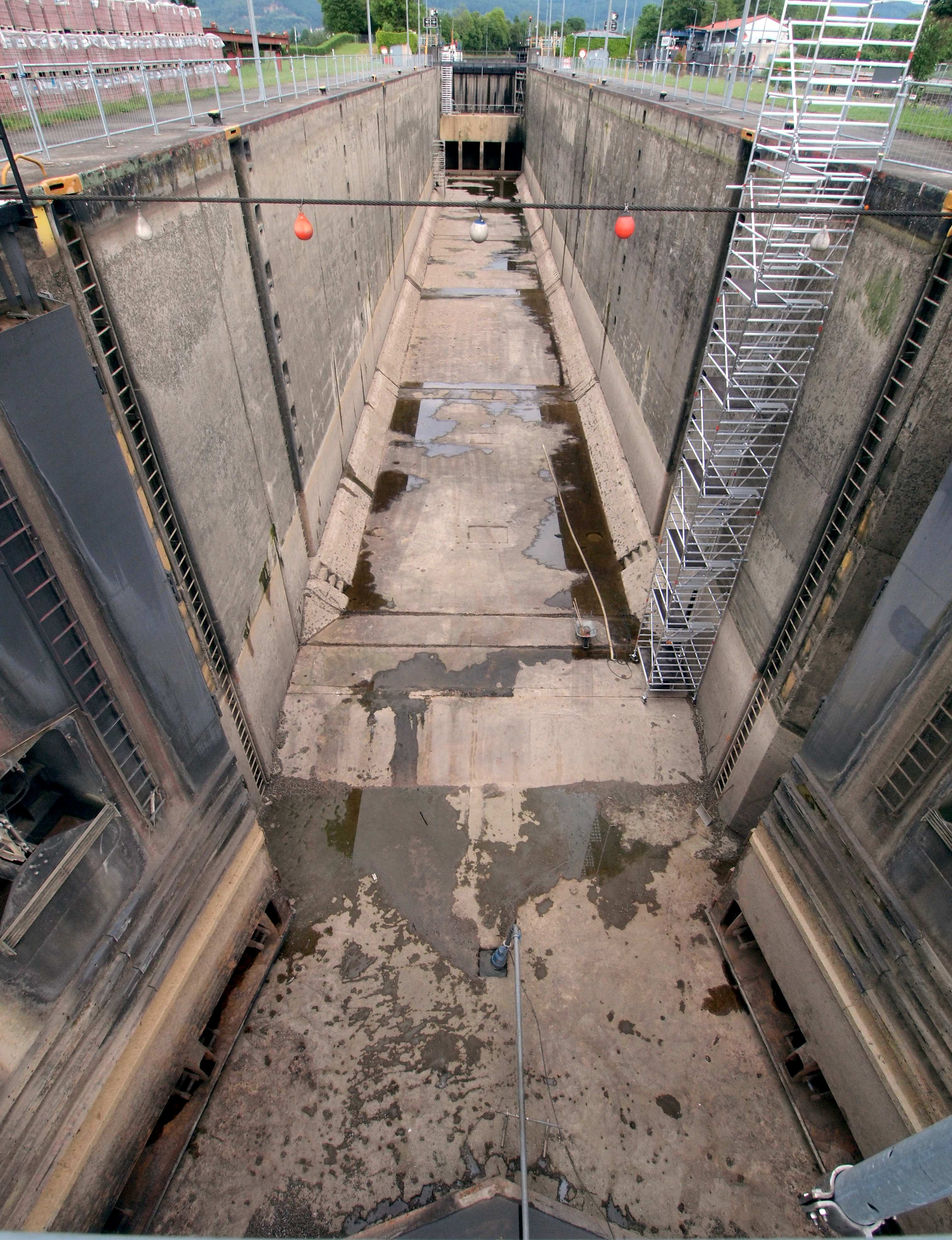 Schleuse Schwabenheim, leere rechte Kammer